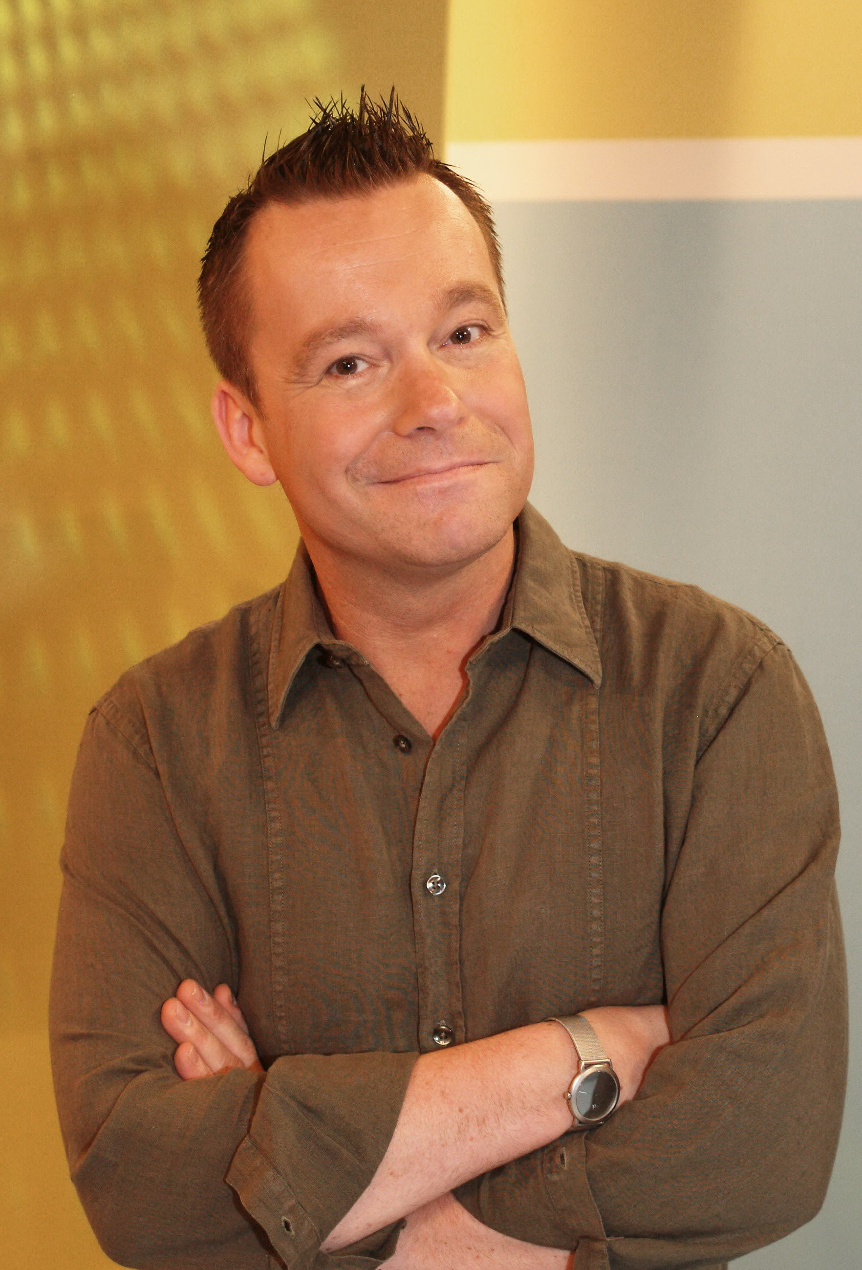 Torgen Schneider - Journalist und Moderator